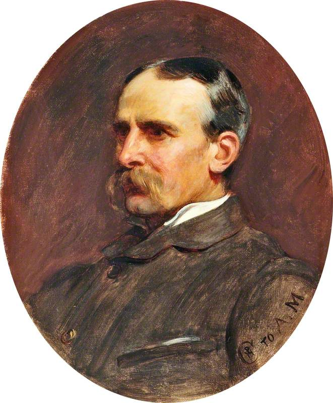 Philip Hermogenes Calderon, Briton Rivière, oil on canvasmedium QS:P186,Q296955;P186,Q4259259,P518,Q861259, Aberdeen Art Gallery Parent institutionAberdeen Art Gallery & MuseumsLocationAberdeen City, United KingdomCoordinates57° 08′ 53.52″ N, 2° 06′ 08.64″ W Established1885Web page control : Q4666883 VIAF: 156765494 ISNI: 0000 0001 2192 5852 ULAN: 500304412 LCCN: n50050112 NLA: 36534393 WorldCat institution QS:P195,Q4666883